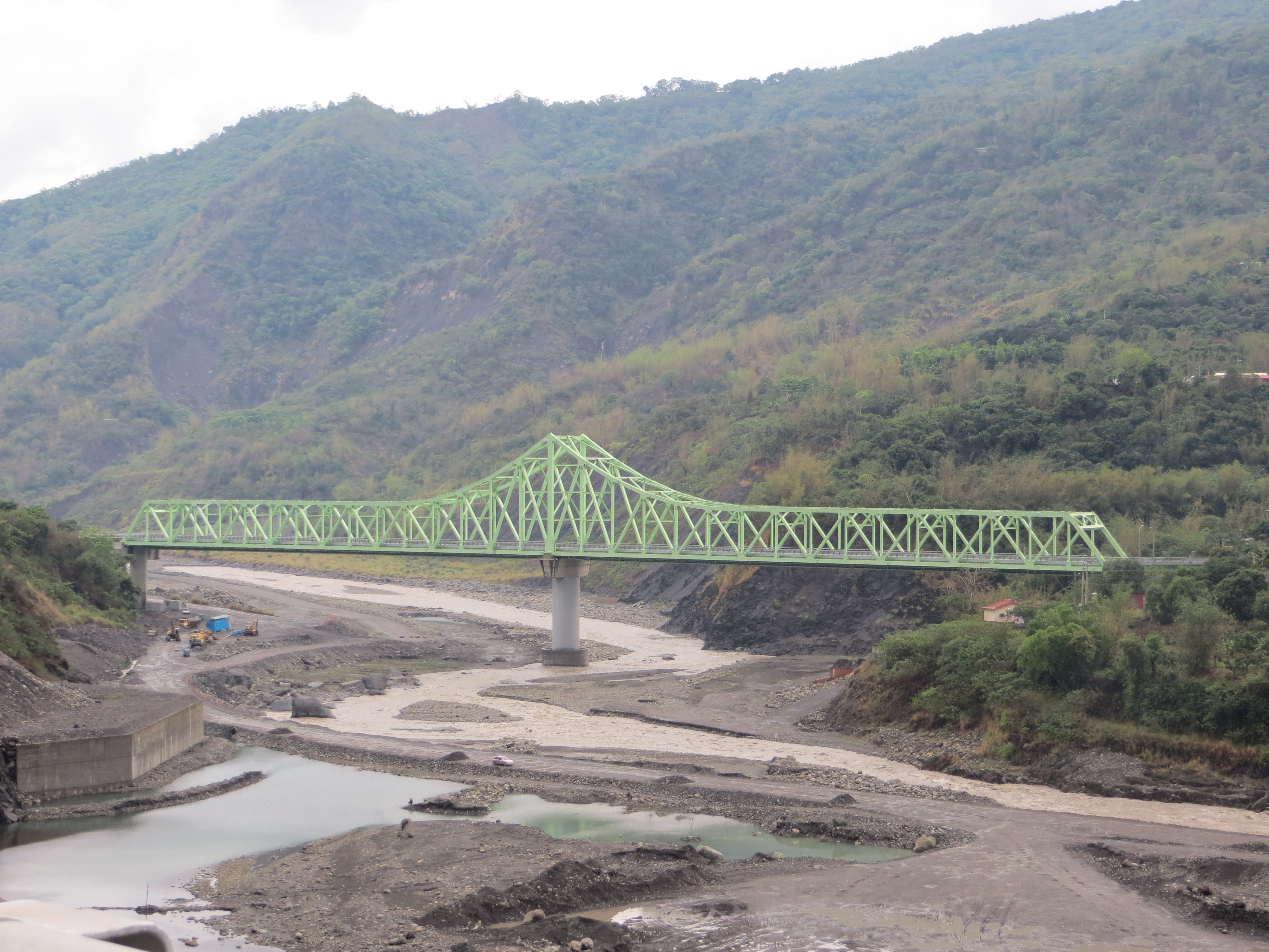 中文（台灣）: 自高133鄉道眺望新發大橋，遠鏡頭。